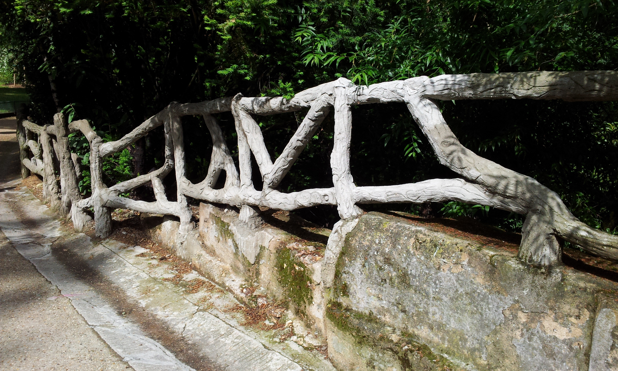 Paris 14e arrondissement - Parc Montsouris - balustrade en ciment faux-bois